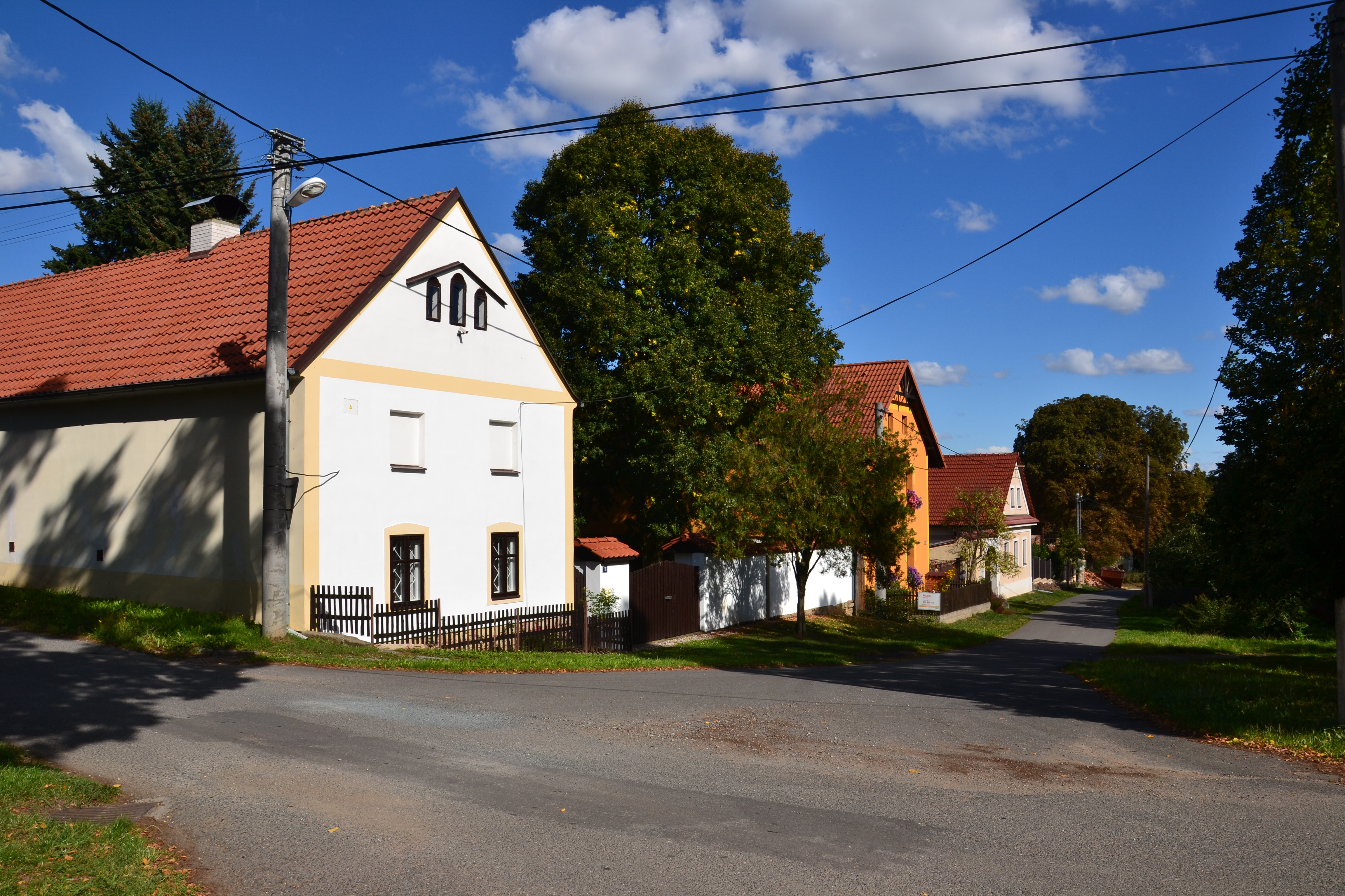 Domy u návesního rybníku